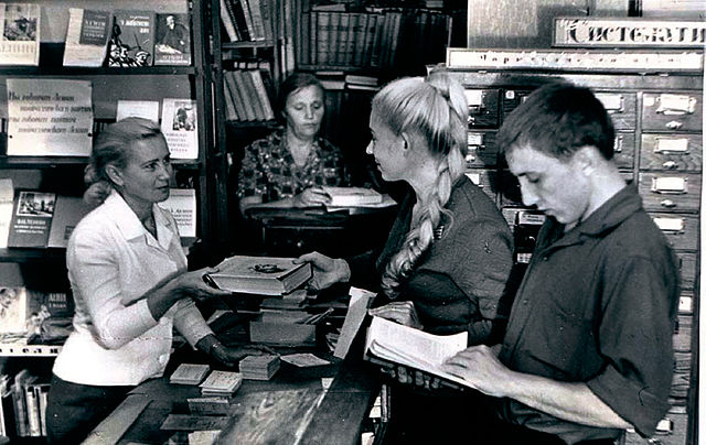 Обслуговування читачів у Науковій бібліотеці НПУ ім. Драгоманова у 60-70-ті роки (Історія та сьогодення наукової бібліотеки, с. 289)